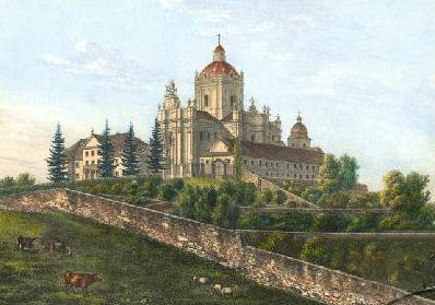 Изображение западного и южного фасада архикафедрального собора Святого Юра и прилегающих домов, на первом плане - кафедральный сад.